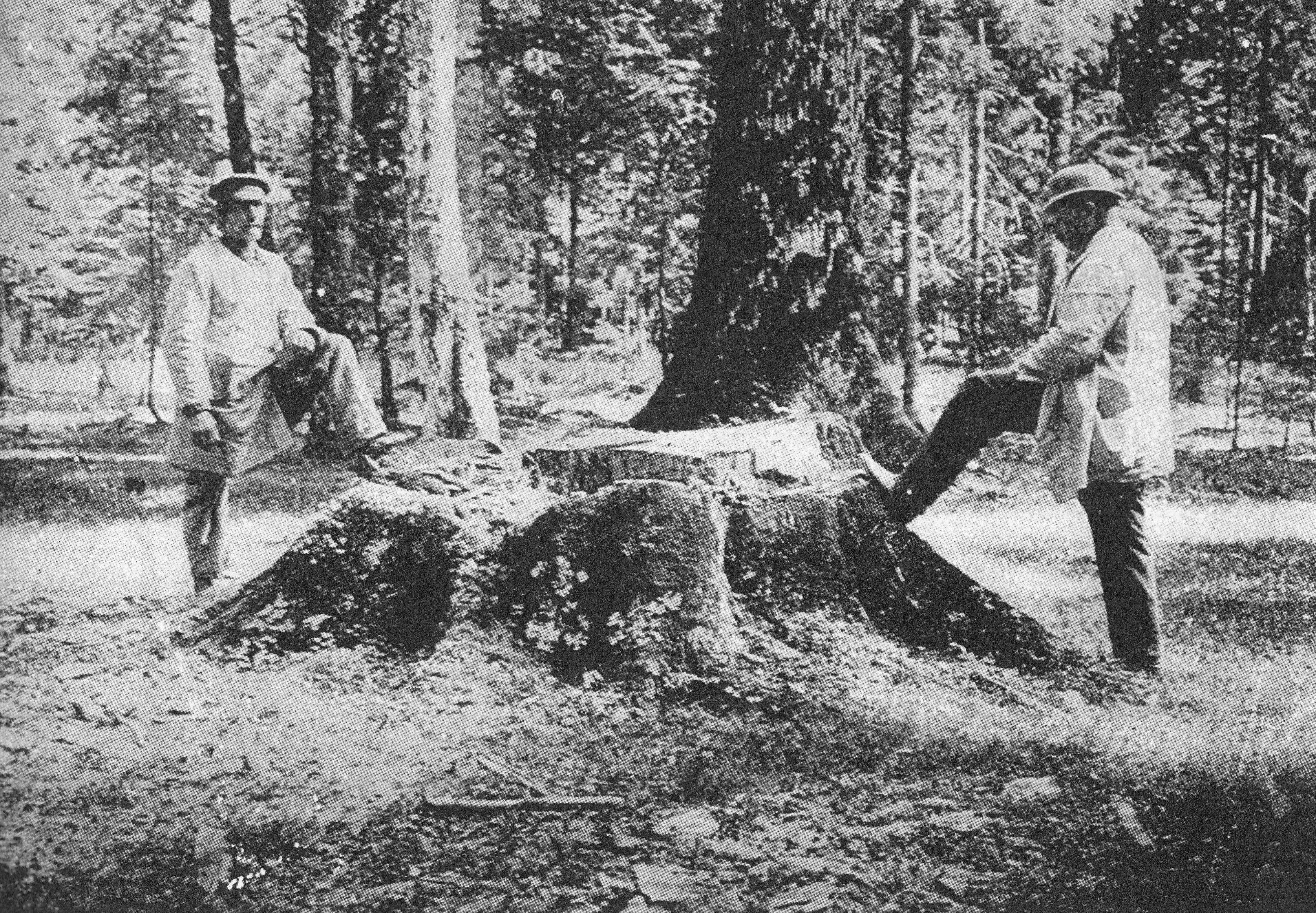 Pień ściętego 500-letniego dębu w Puszczy Białowieskiej